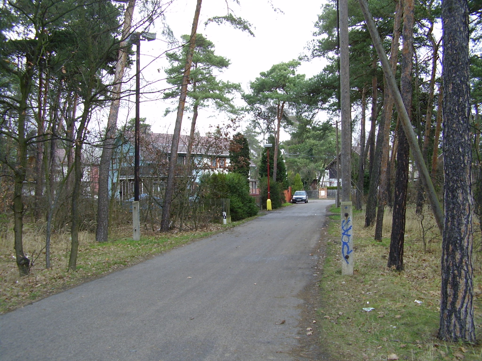 Mlékojedy - kolonie